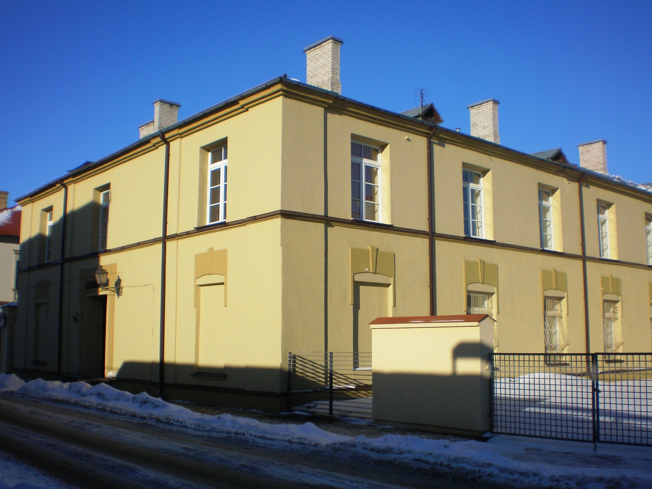 Kėdainių prokuratūra, Didžioji g.